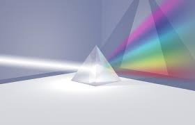 La óptica es una disciplina científica derivada de la física, encargada del estudio de la luz y sus distintos fenómenos que son de gran interés para la física.Desde el punto de vista físico, la luz es una onda electromagnética. Según el modelo utilizado para la luz, se distingue entre las siguientes ramas, por orden creciente de precisión (cada rama utiliza un modelo simplificado del empleado por la siguiente): La óptica geométrica: Trata a la luz como un conjunto de rayos que cumplen el principio de Fermat. Se utiliza en el estudio de la transmisión de la luz por medios homogéneos (lentes, espejos), la reflexión y la refracción. La óptica electromagnética u óptica física: Considera a la luz como una onda electromagnética, explicando así la difracción, interferencia, reflectancia y transmitancia, y los fenómenos de polarización y anisotropía. Leer más